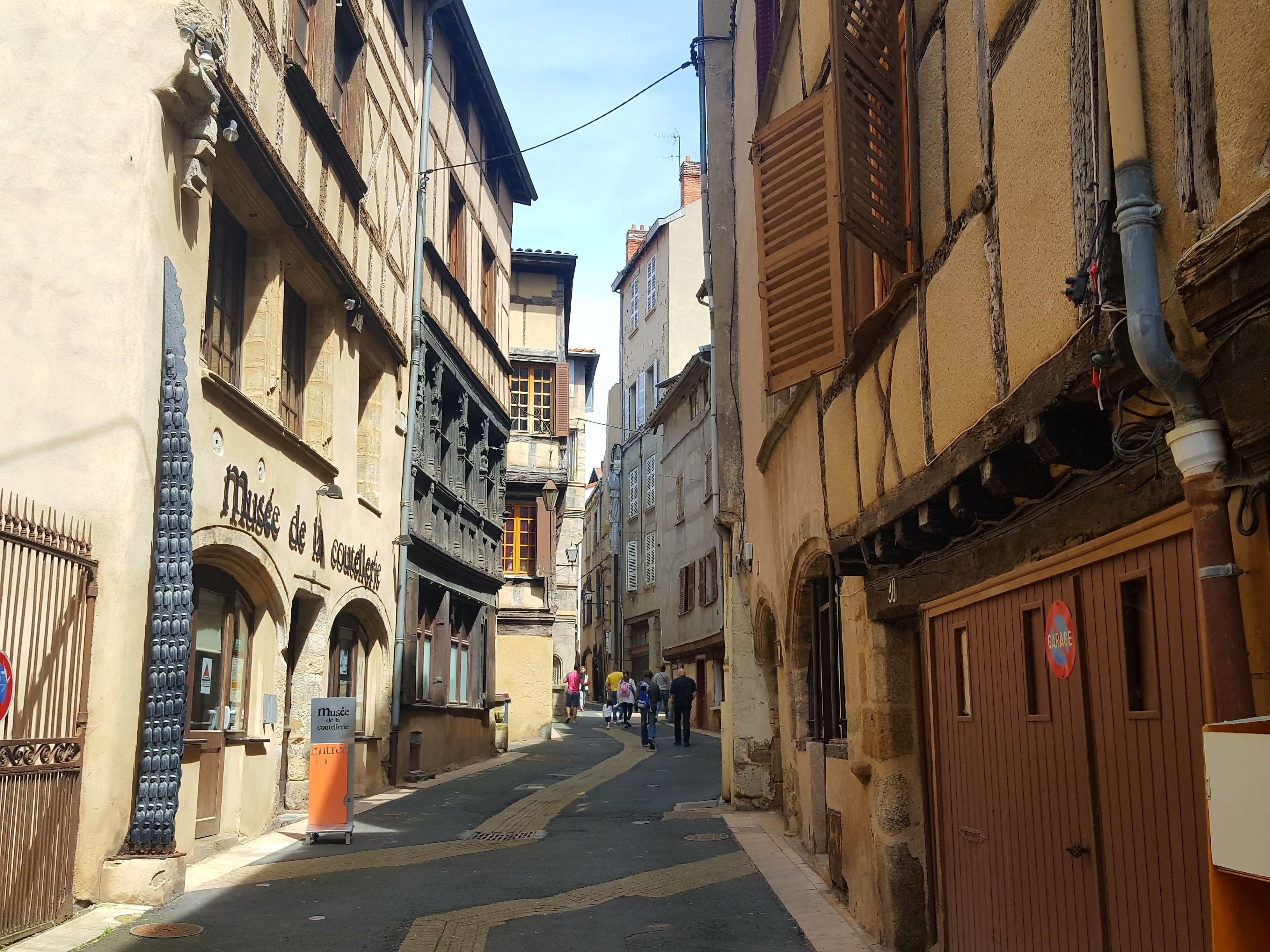 Musée et Rue de la coutellerie à Thiers 63